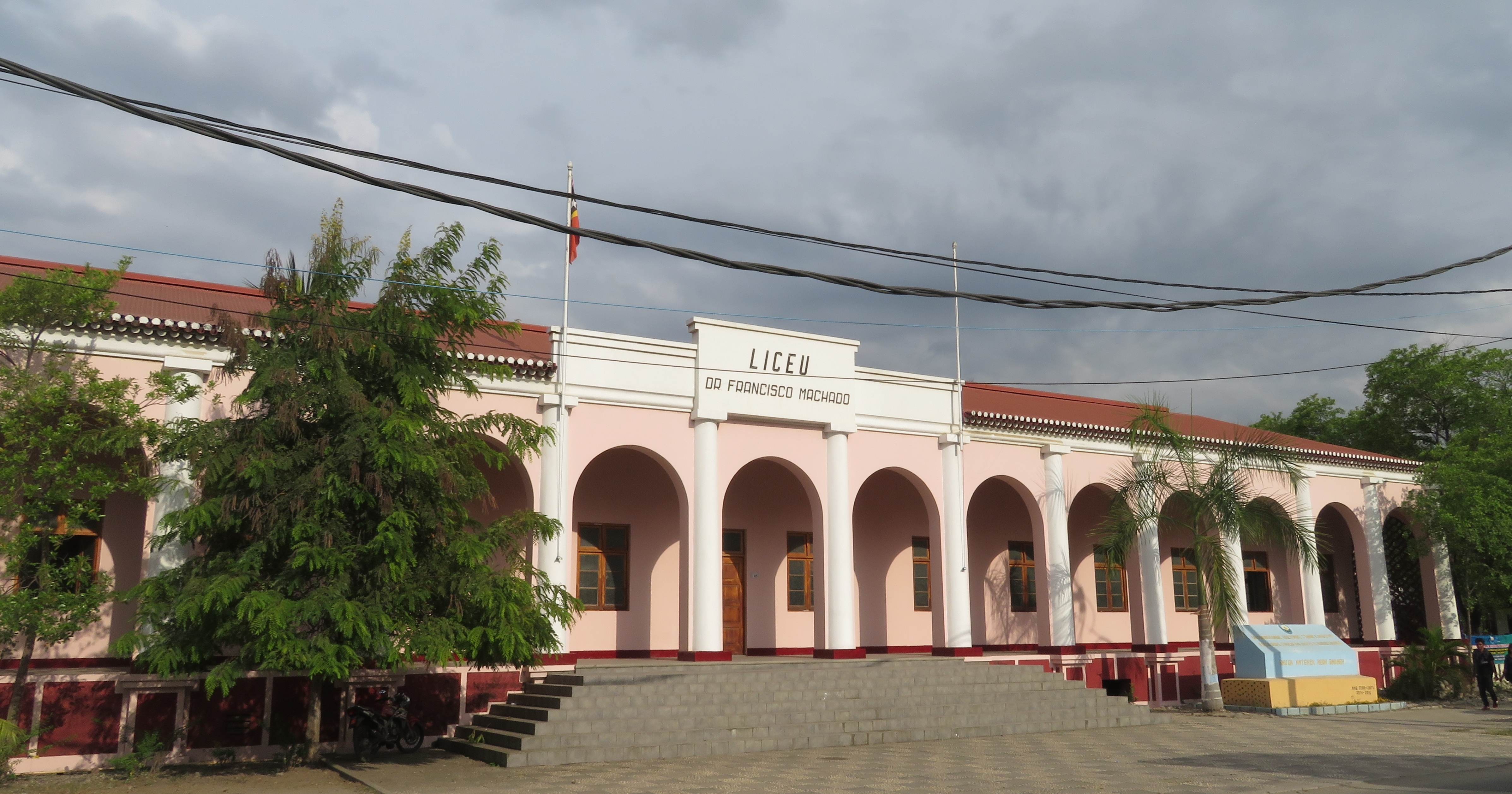 Liceu machado, Dili, Osttimor